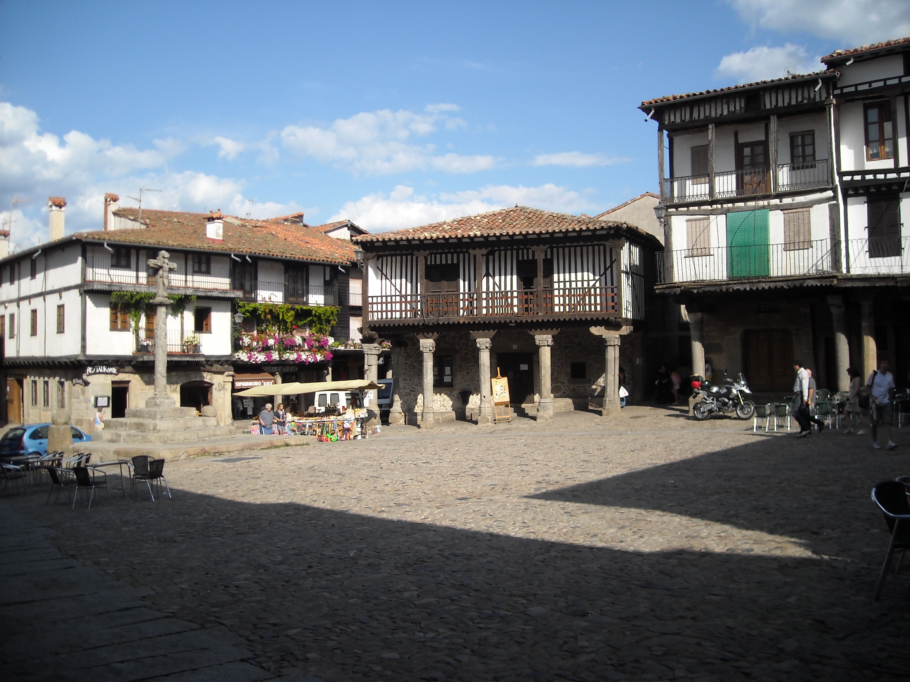 Plaza Mayor, La Alberca, Salamanca, España